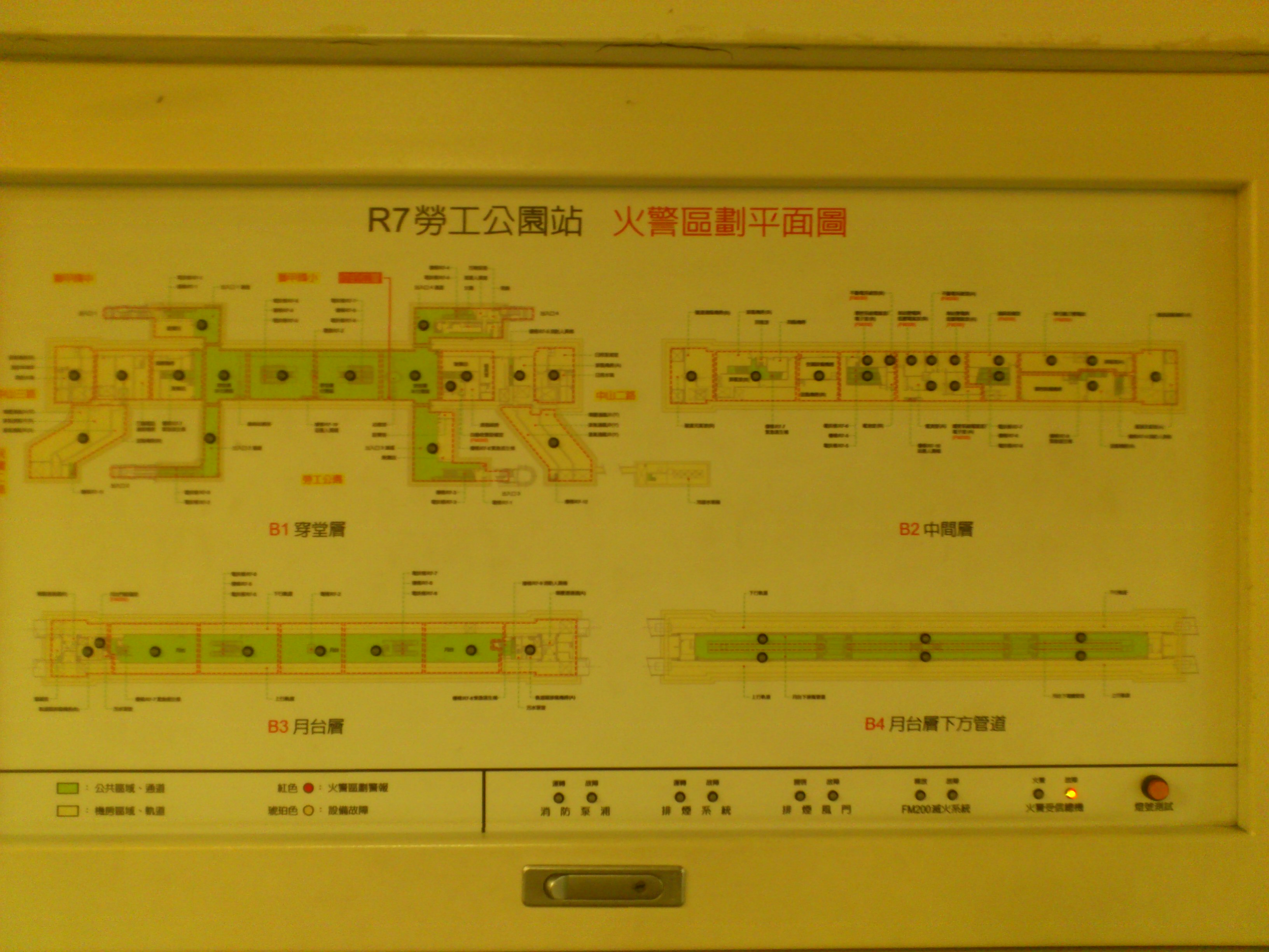 高雄捷運勞工公園站（今獅甲站）火警區劃平面圖。